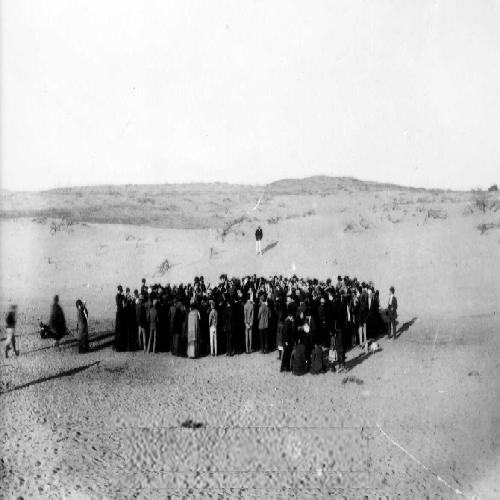 תל- אביב אסיפת היסוד בחולות ( 1909)